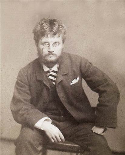 Lothaire de Seebach, Position assise, Face. Bibliothèque nationale et universitaire de Strasbourg